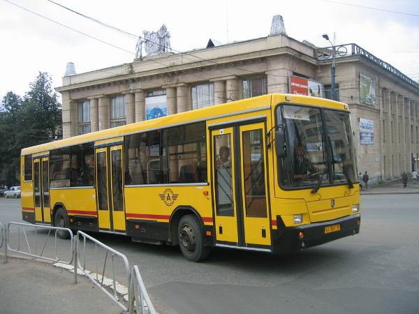 Автобус Ижевска